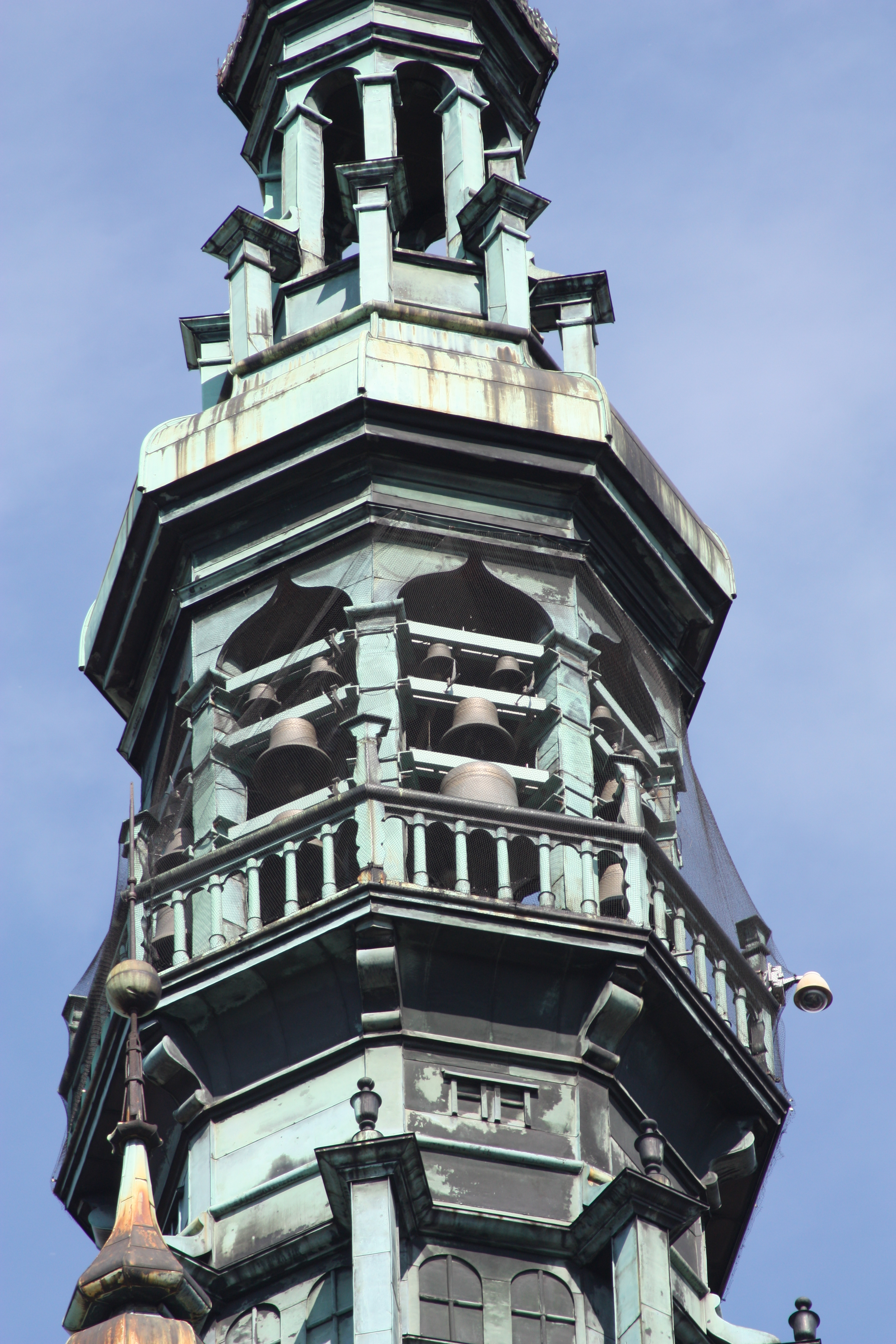 Gdańsk; Touristenfotos 2009